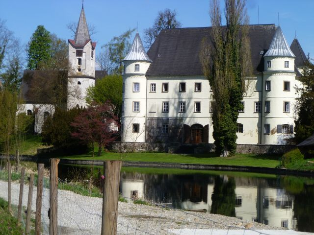 Schloss_Hagenau_-_1